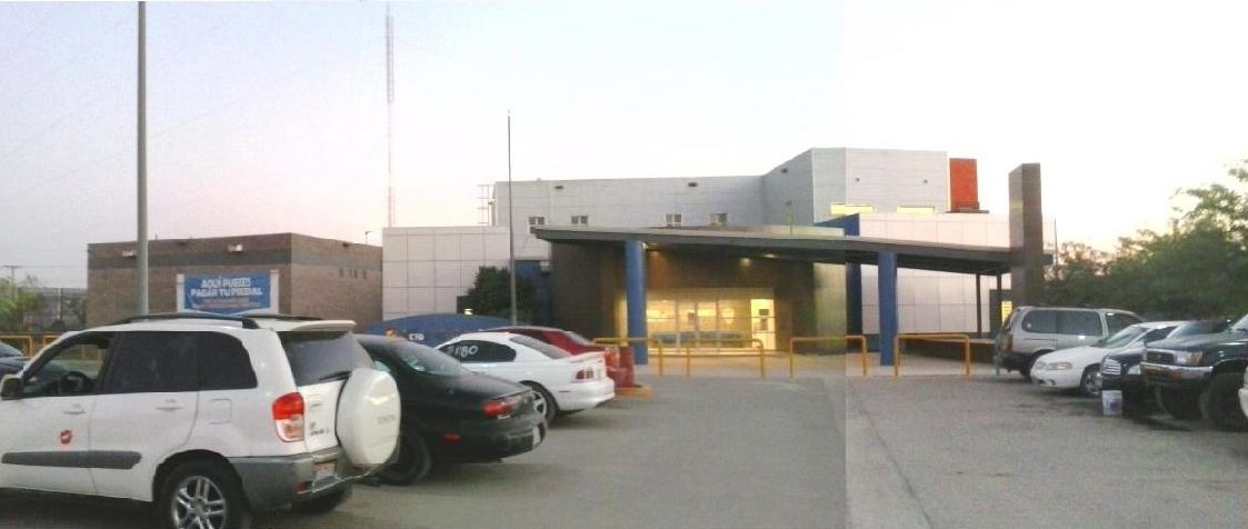 un par de fotos montadas mostrar la sub-comandancia poniente. a finales de octubre de 2014